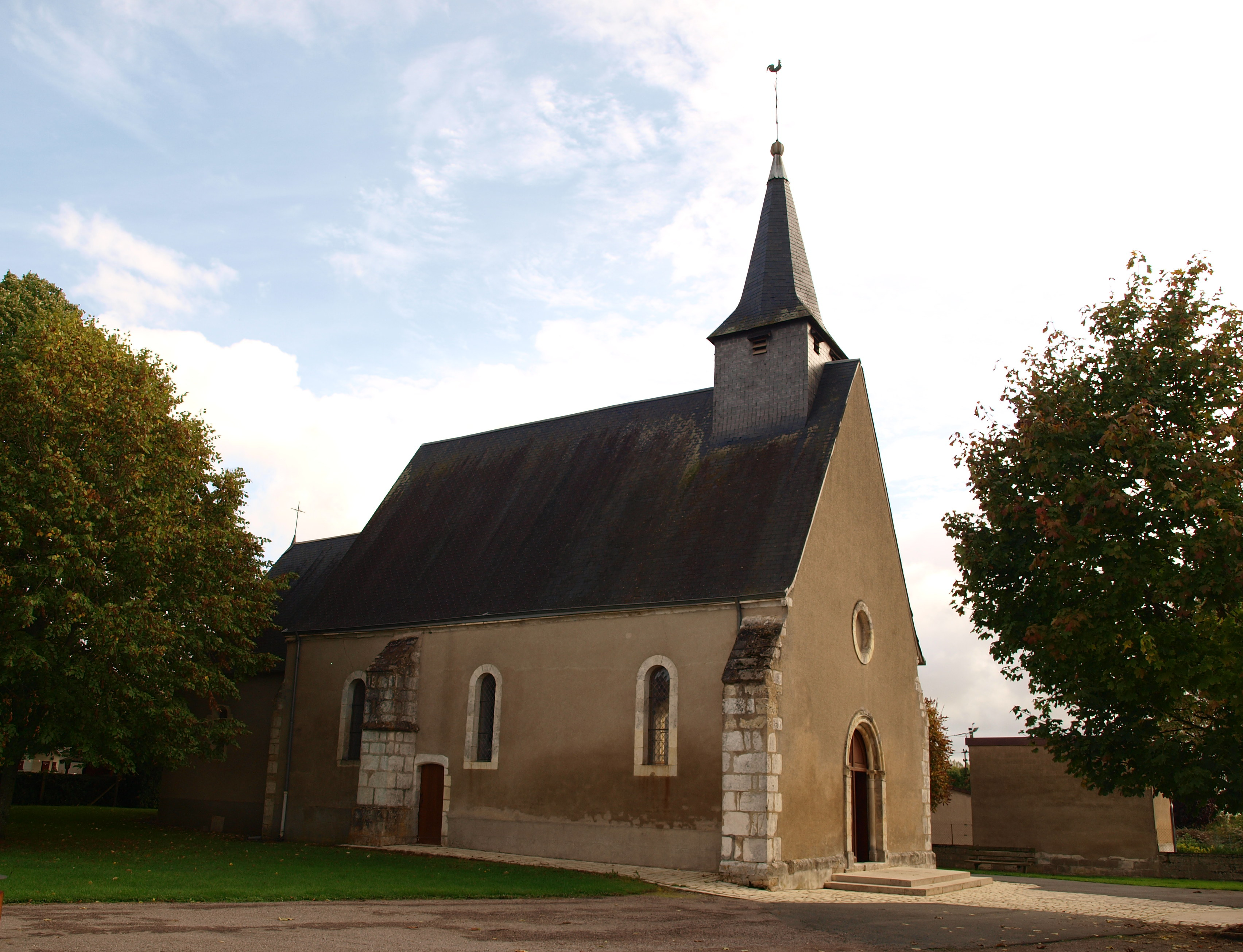 Saint-Valentin (Indre, France) ; église